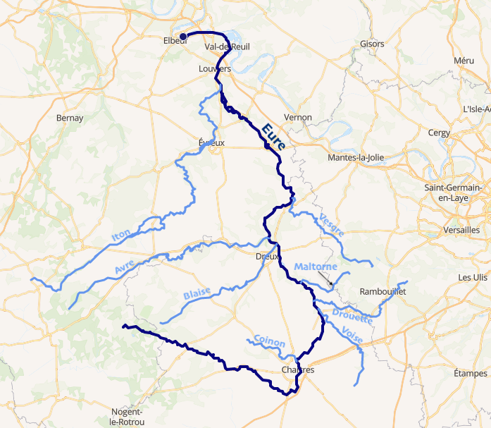 carte réalisée sur umap This map may be incomplete, and may contain errors. Don't rely solely on it for navigation.